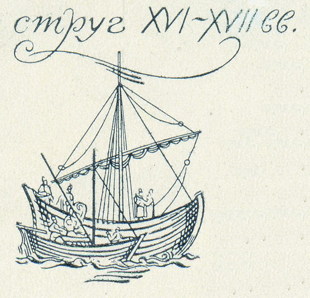 Ausschnitt aus der russischen Briefmarke "Paketboot 18. Jh./ Strug 16. - 17. Jh." von 1987